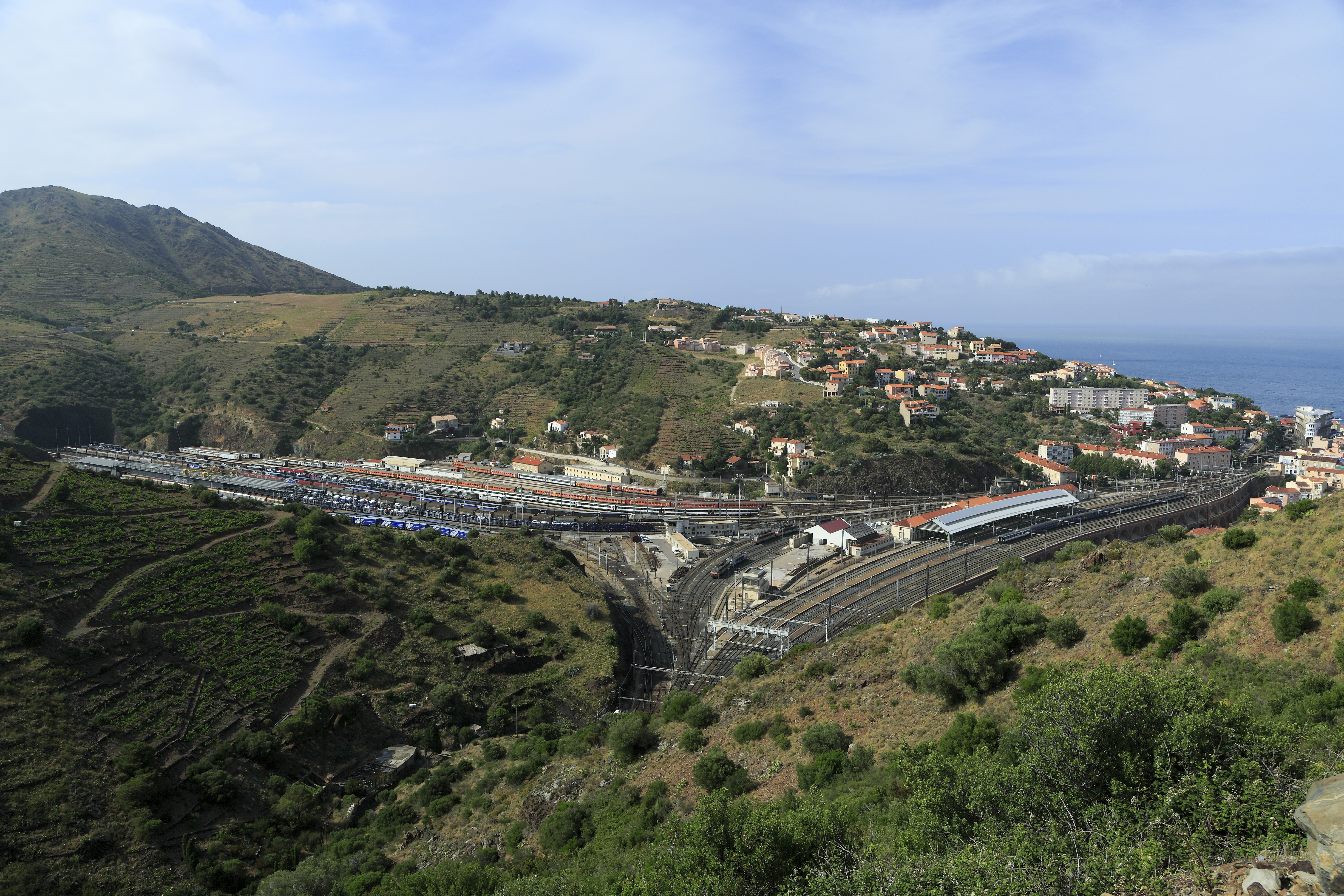 von der Passstraße N260/D914 über den Coll de Belitres, in Bildmitte nach unten führen die Streckengleise durch den Tunnel nach Portbou.